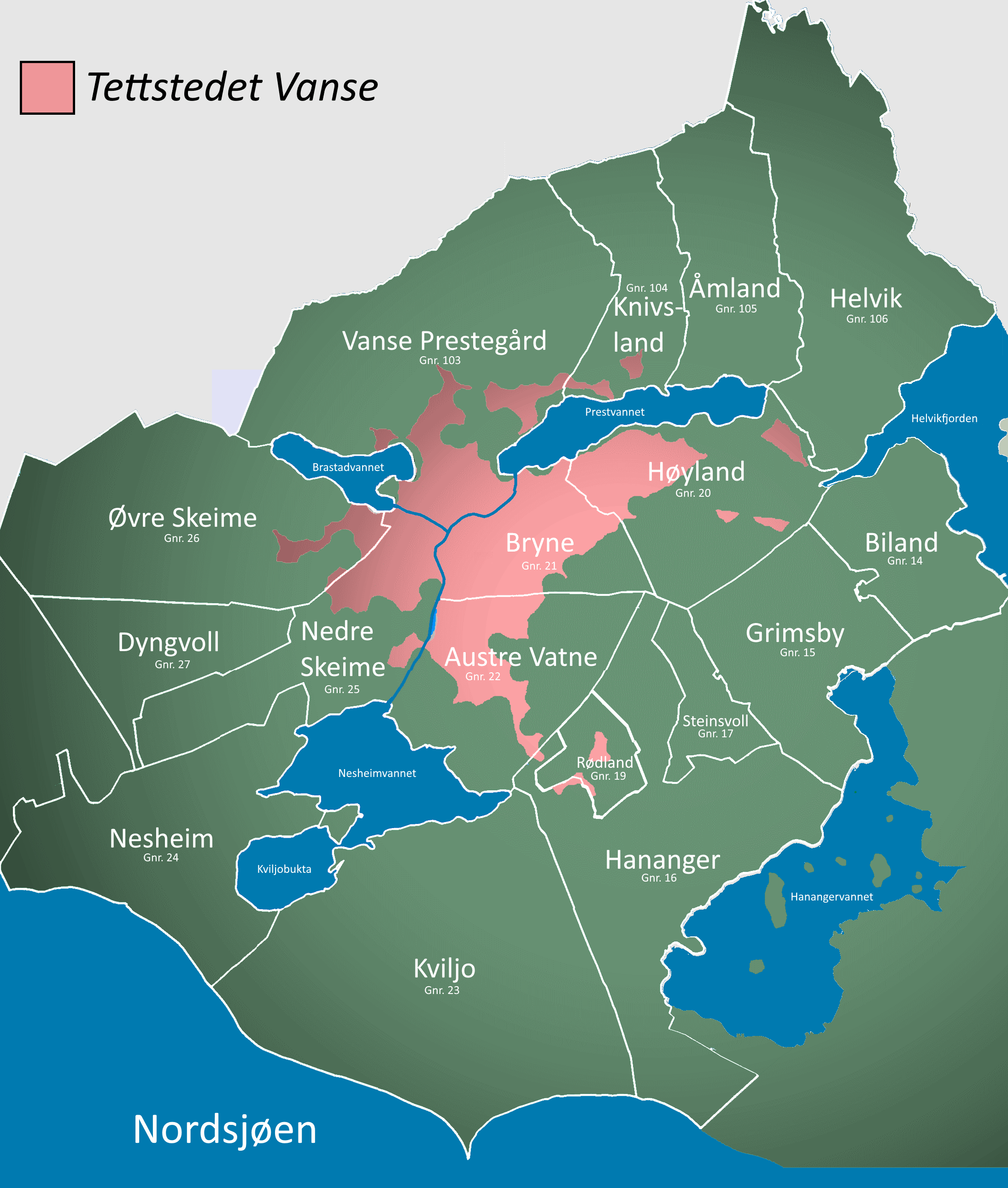 Kartet viser områdene som tettstedet Vanse omfatter, samt omkrinliggende områder. - Tettstedet utført i henholt til gjeldende kart på SSB, - Gårdsnavn i Listaboka II av K. Rundjord. - Gårdsnummer og grenser i henhold til norgeskart.no Områdene er merket med gårdsnavn tilhørende hvert gårdsnummer: - Gårdsnummer 14: Biland - Gårdsnummer 15: Grimsby - Gårdsnummer 16: Hananger - Gårdsnummer 17: Steinsvold - Gårdsnummer 20: Høyland - Gårdsnummer 21: Bryne - Gårdsnummer 22: Austre Vatne - Gårdsnummer 23: Kviljo - Gårdsnummer 24: Nesheim - Gårdsnummer 25: Nedre Skeime - Gårdsnummer 26: Øvre Skeime - Gårdsnummer 27: Dyngvold - Gårdsnummer 103: Vanse Prestegård - Gårdsnummer 104: Knivsland - Gårdsnummer 105: Omland - Gårdsnummer 106: Helvik